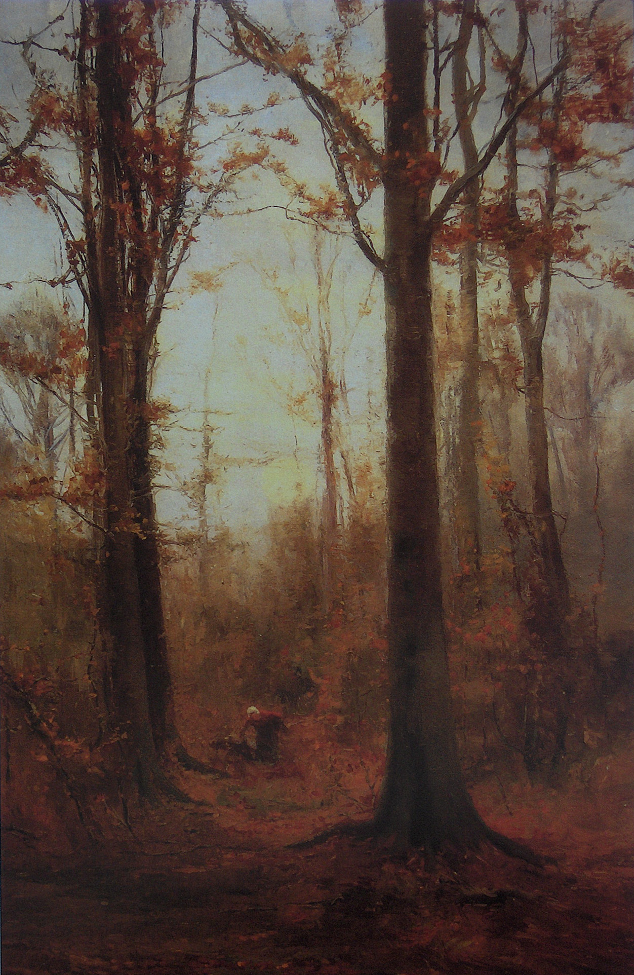 "Houtsprokkelaarster in het Zoniënwoud" - olieverf op doek door Adolphe Hamesse (1849-1925); 93 x 57 cm; privé-bezit